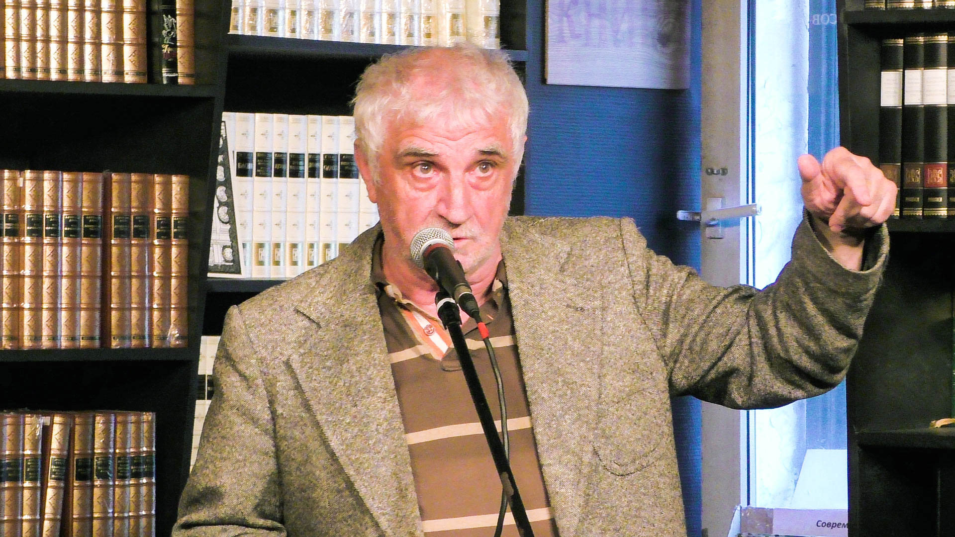 Игорь Иртеньев в книжном магазине "Гиперион" 10.07.2017.